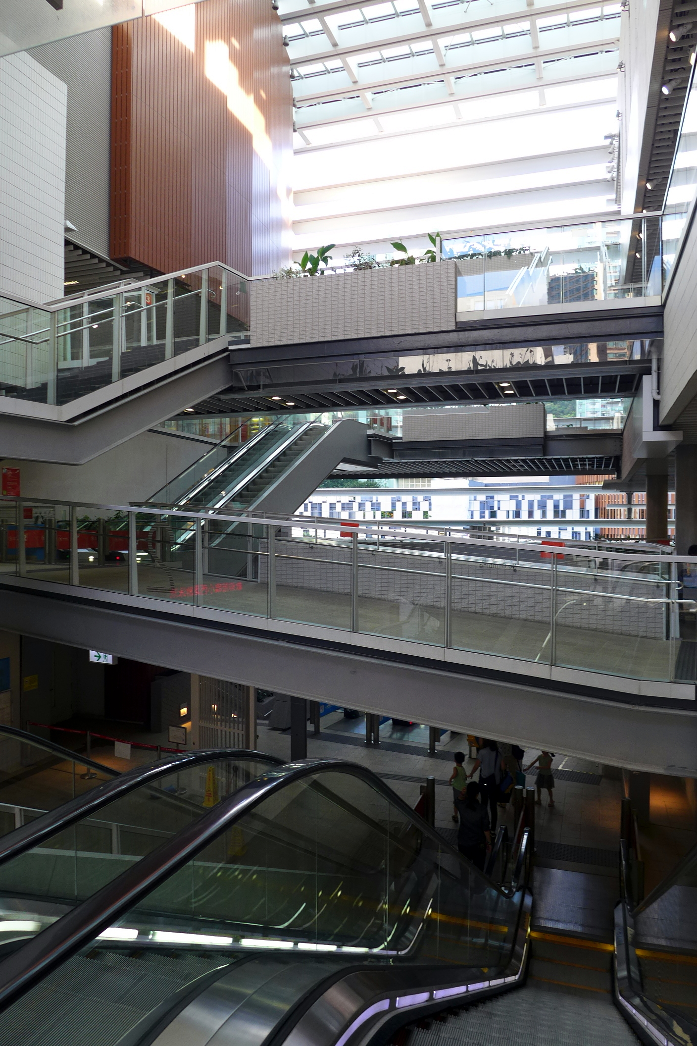 Siu Sai Wan Complex